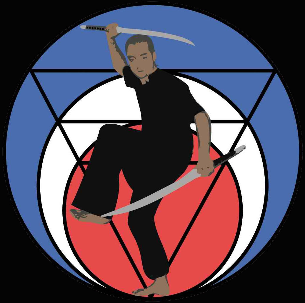 hanthawaddy_couleur_figurine.jpg